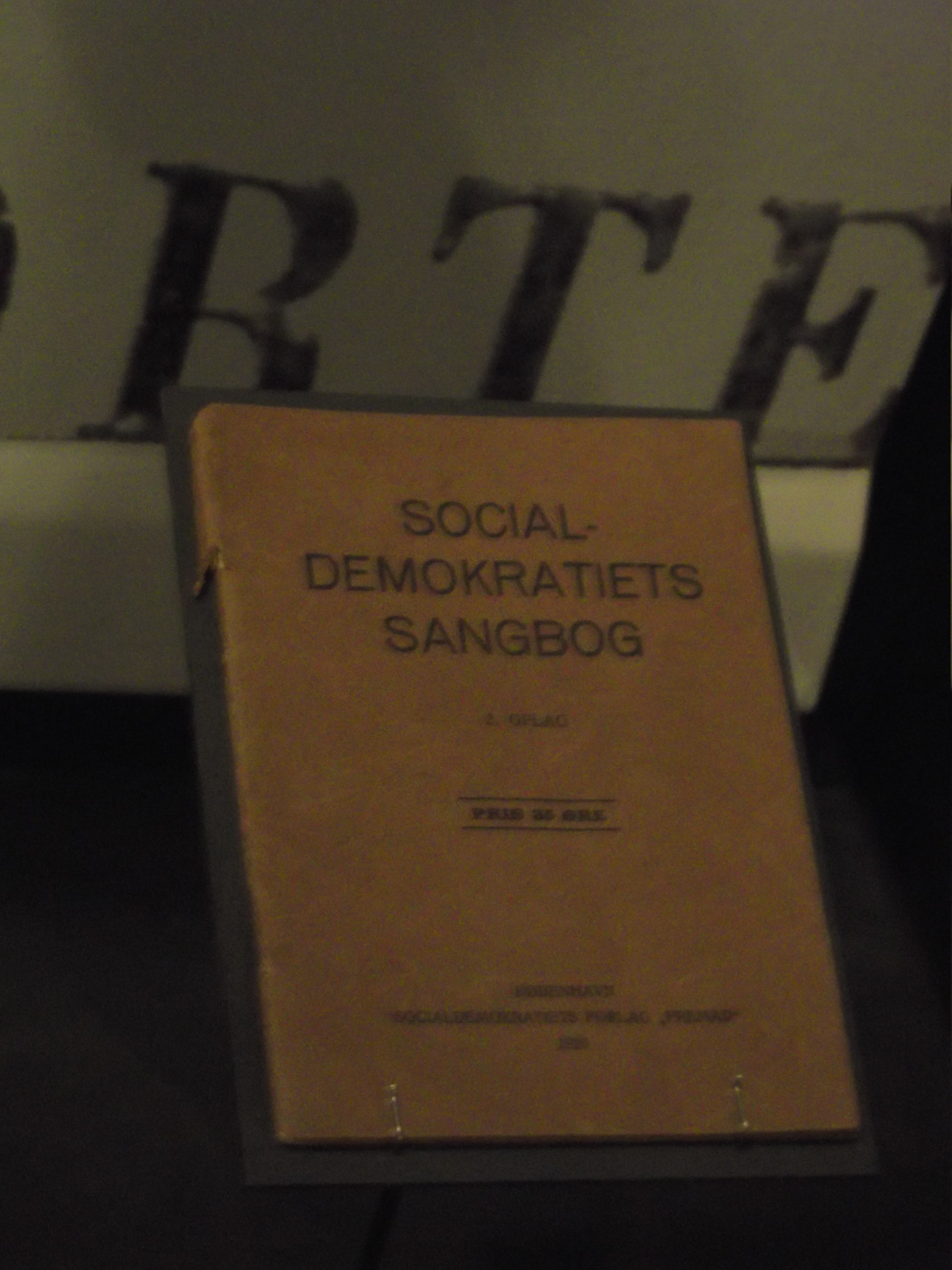 Socialdemokratiets Sangbog